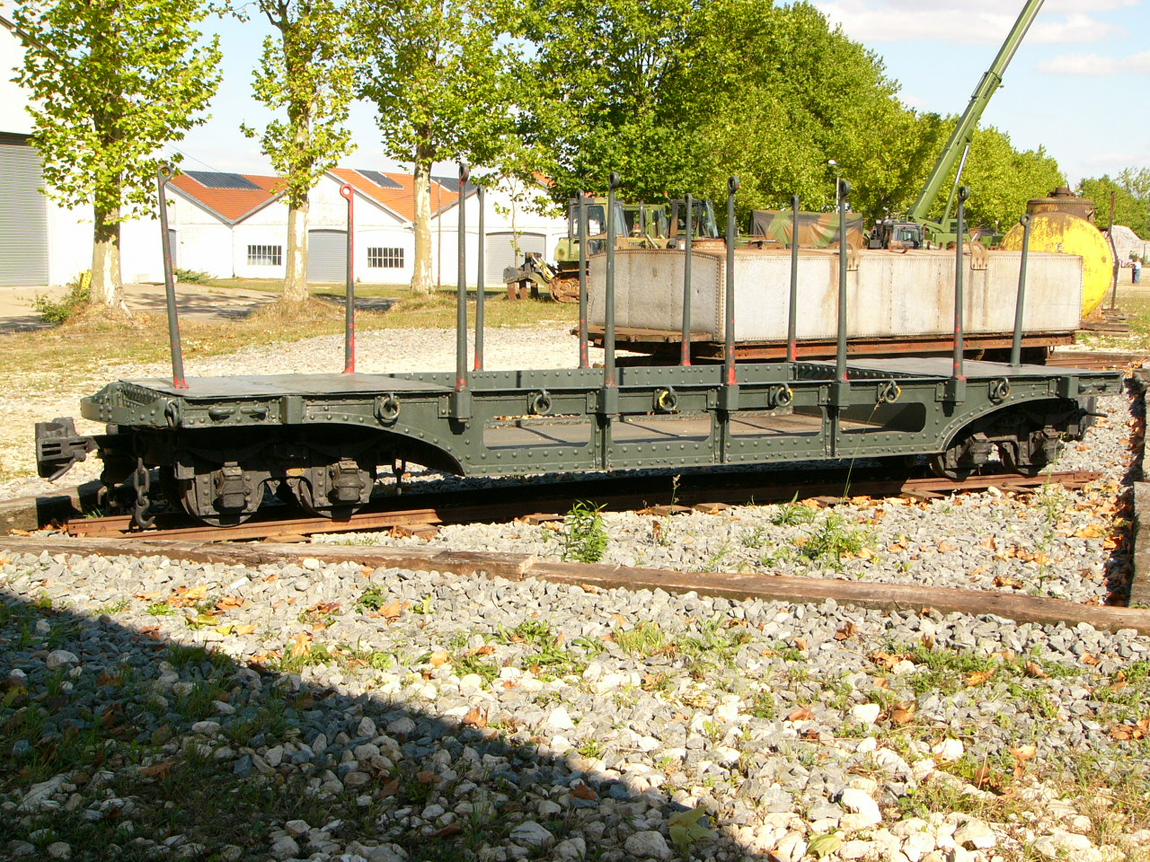 Wagon système Péchot au camp de Versailles_Matelots (5e régiment du Génie)